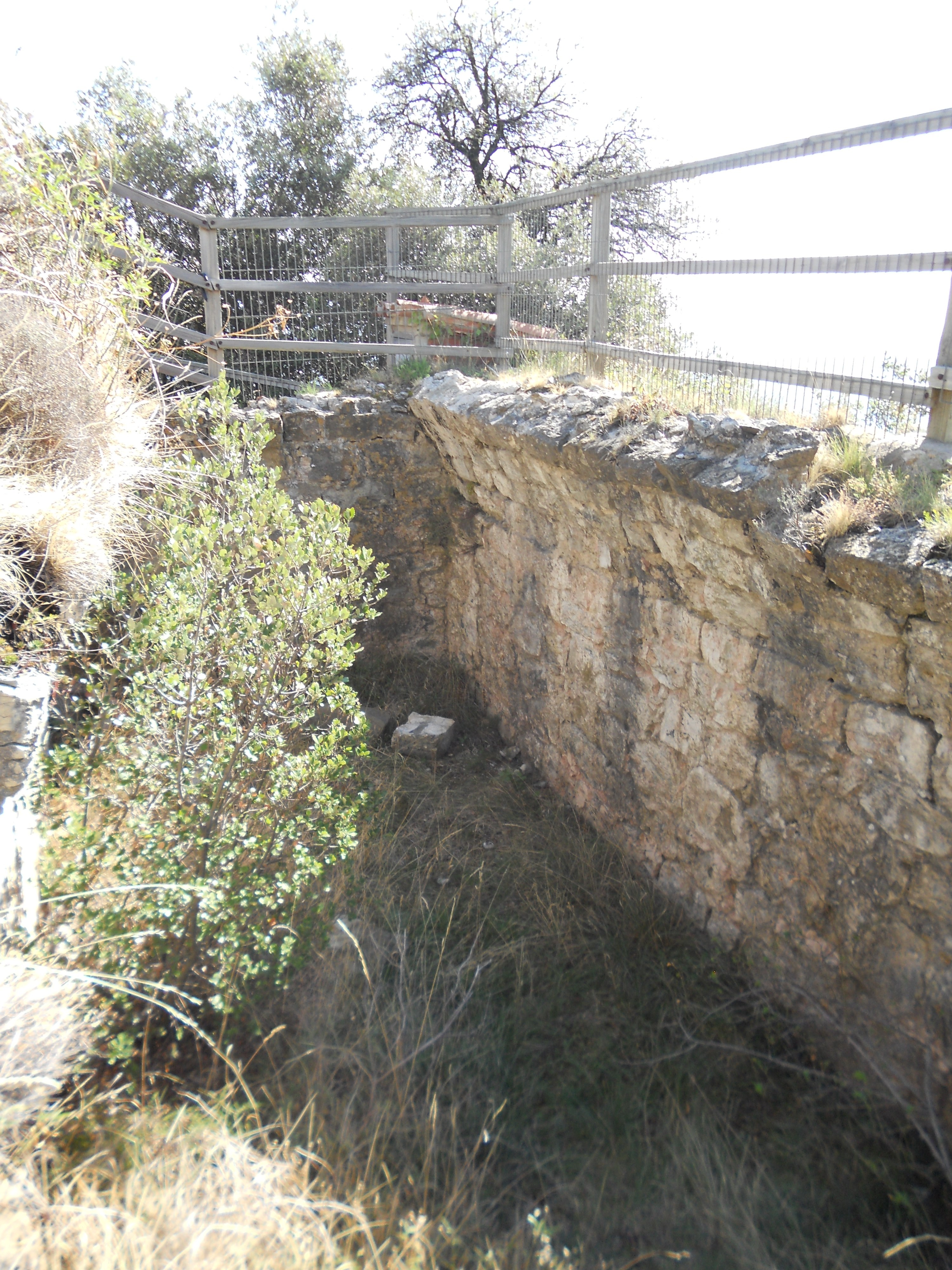 Murs del Castell de Castelló d'en Bas, a l'actual municipi de la Vall d'en Bas a la Garrotxa.